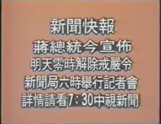 中文（台灣）: 1987年（中華民國76年）7月14日，中國電視公司新聞部新聞快報字卡：中華民國總統蔣經國今天宣布，明天零時解除戒嚴令。行政院新聞局將於今晚六時舉行記者會說明。詳情請看今晚七時三十分《中視新聞》。